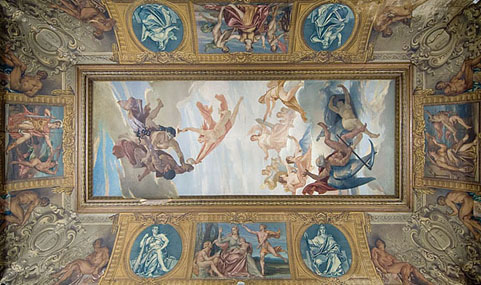 La France arrachant ses archives à la nuit des temps. Peinture de Félix-Armand-Marie Jobbé-Duval.